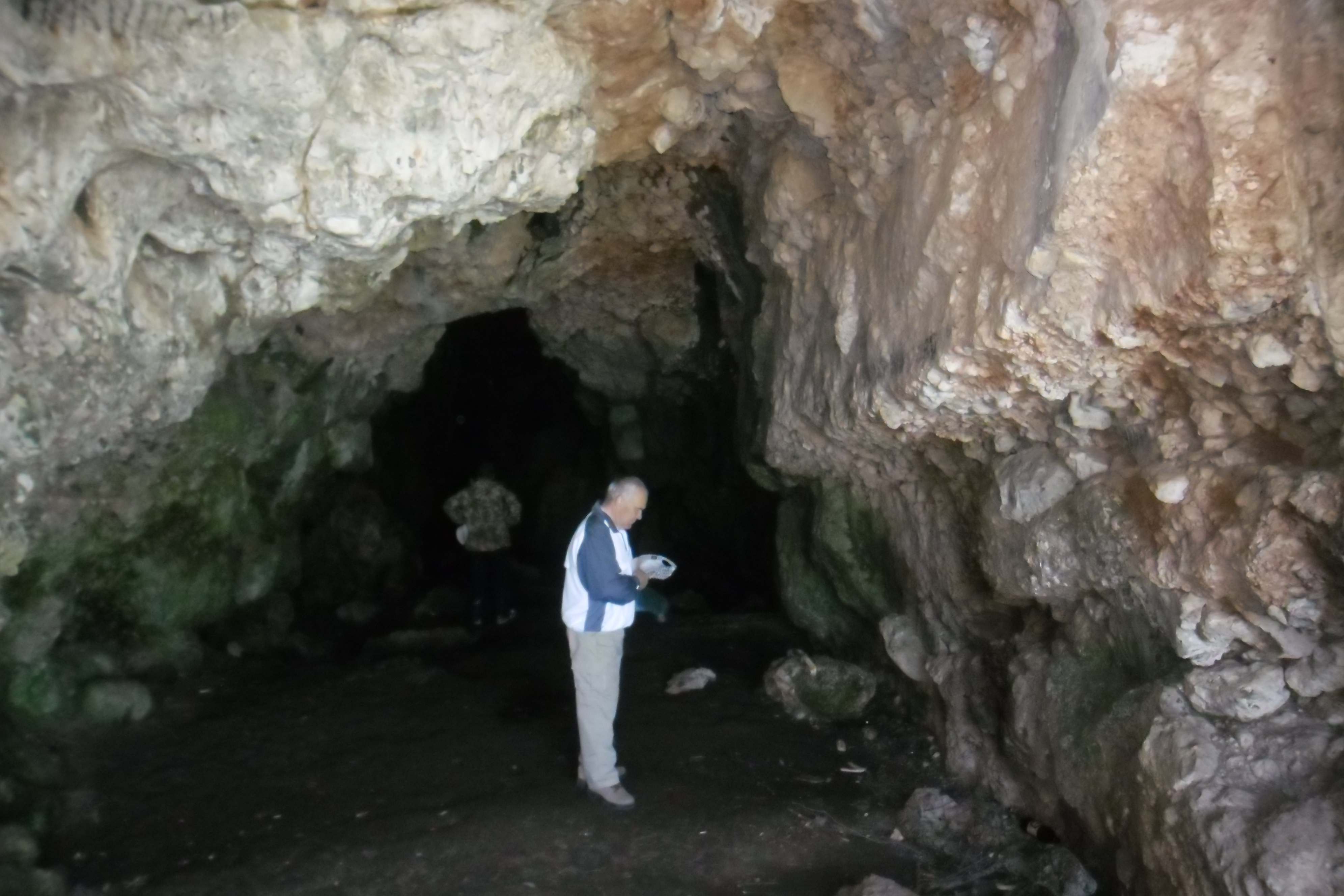 Фото